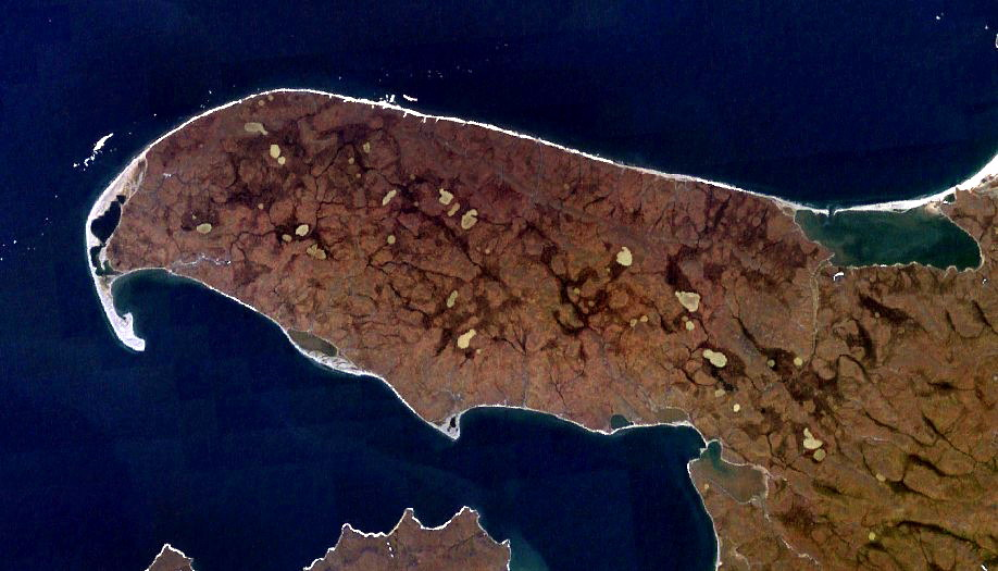 Полуостров Михайлова